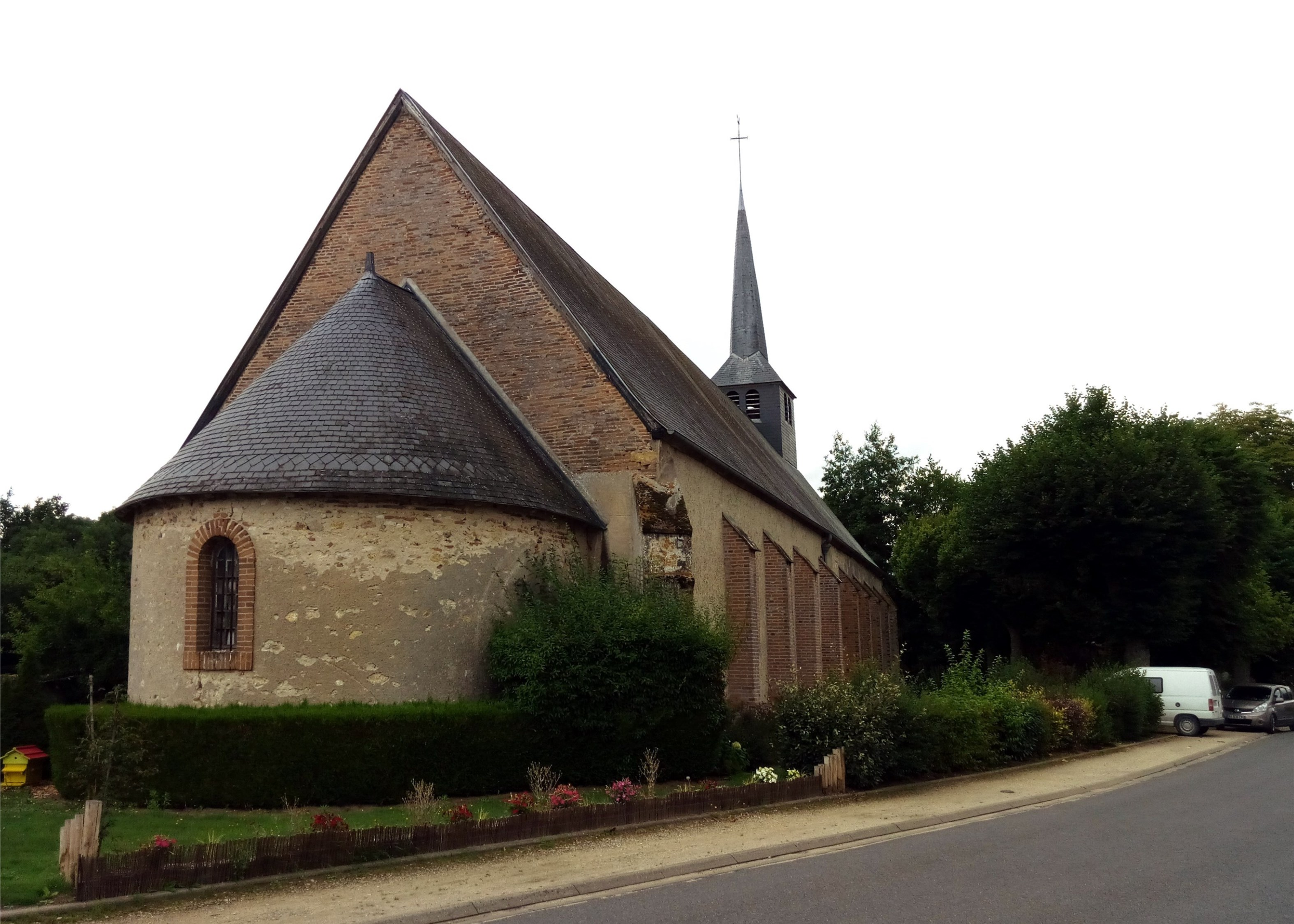 Église Saint Pierre de Vieilles-Maisons-sur-Joudry, Loiret, France.